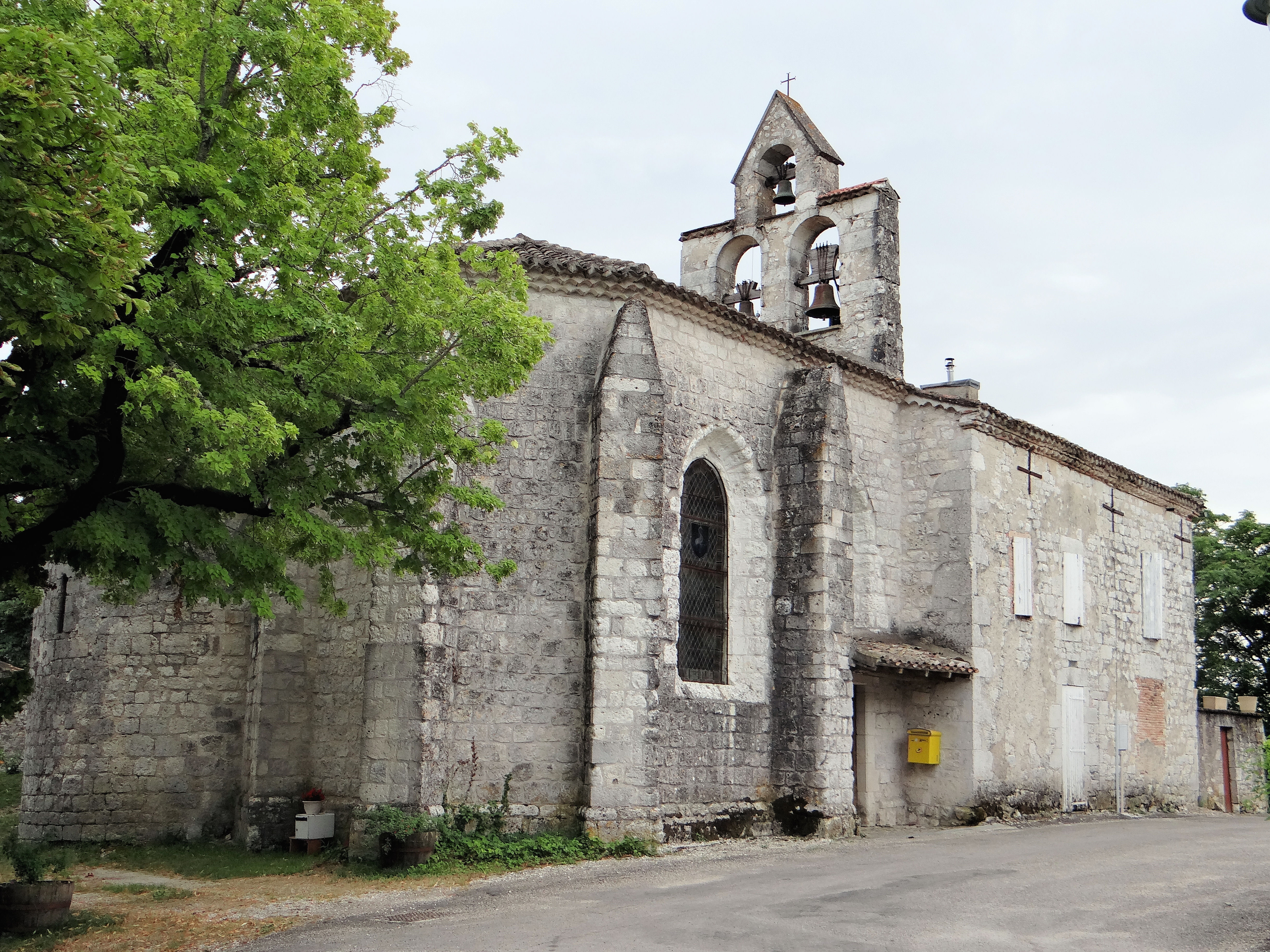 Montagudet - Église Saint-Sulpice-de-Bourges